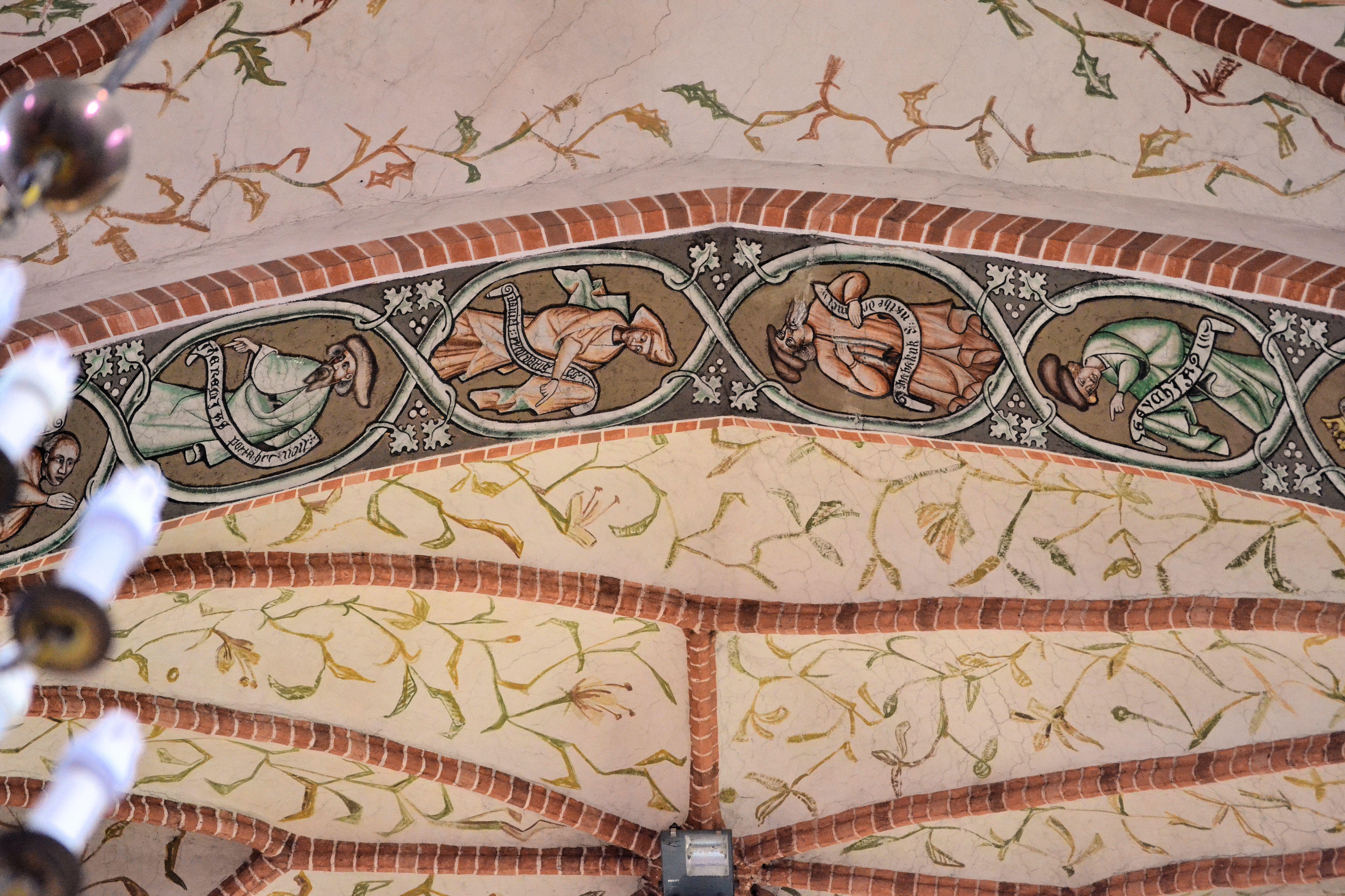 kościół Macierzyństwa NMP Trzebiatów